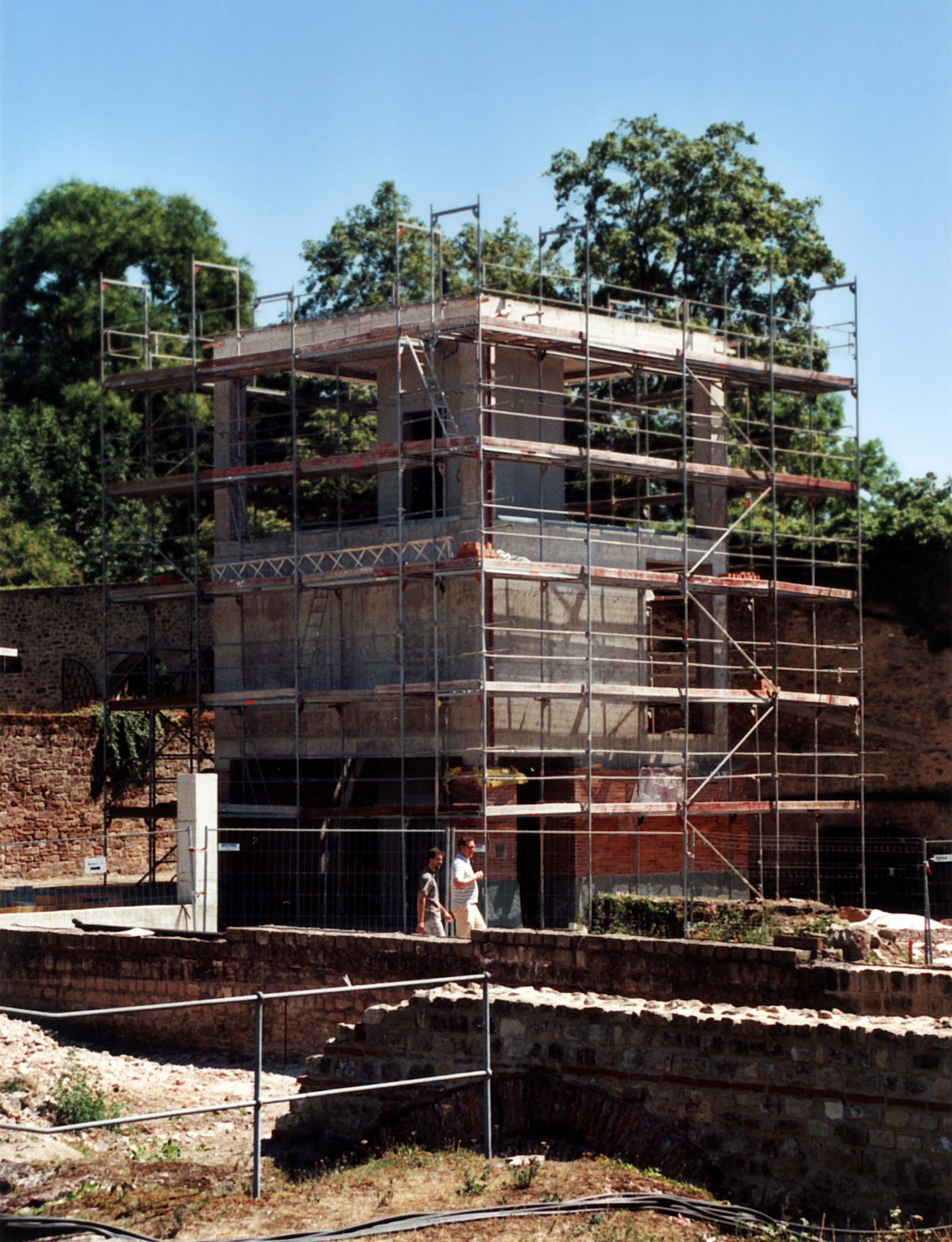 Turmbau für den 2006/2007 neu errichten monumentalen Eingangsbereich in einem sensiblen archäologischen Bereich.